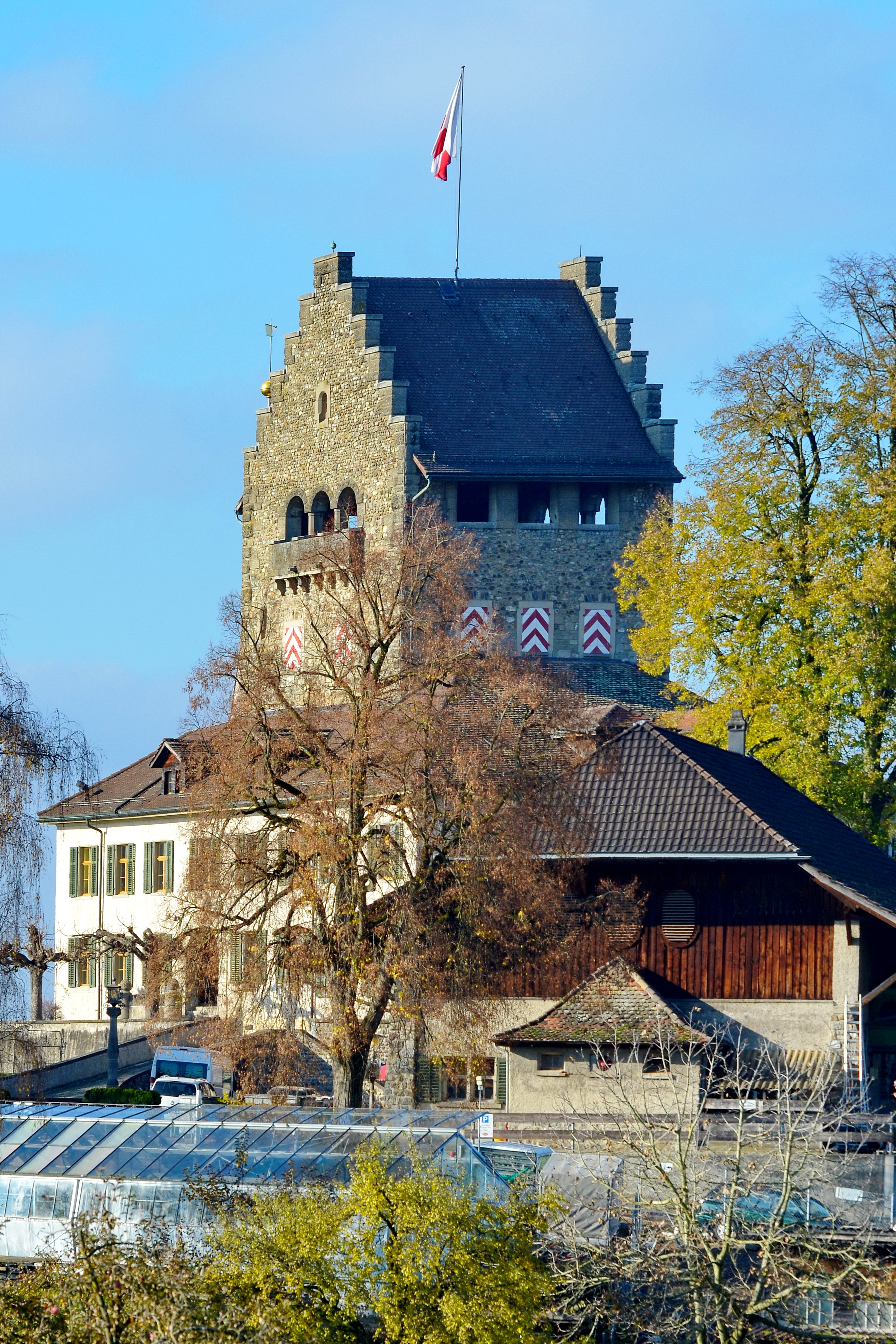 Schloss in Uster (Switzerland)